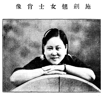 中文（中国大陆）: 施劍翹女士